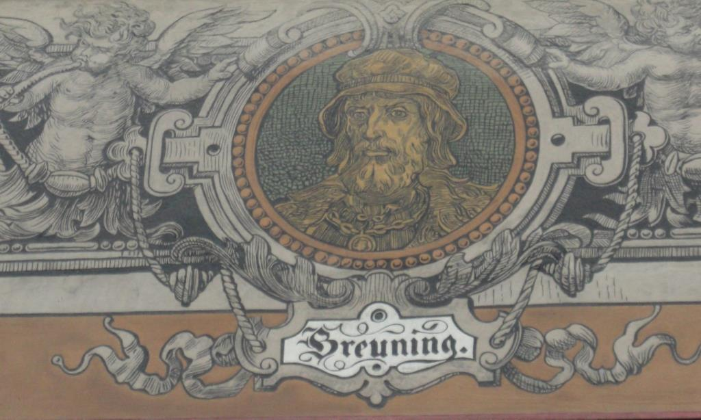 Porträt des Vogts Konrad Breuning (hingerichtet am 27. September 1517) am Tübinger Rathaus